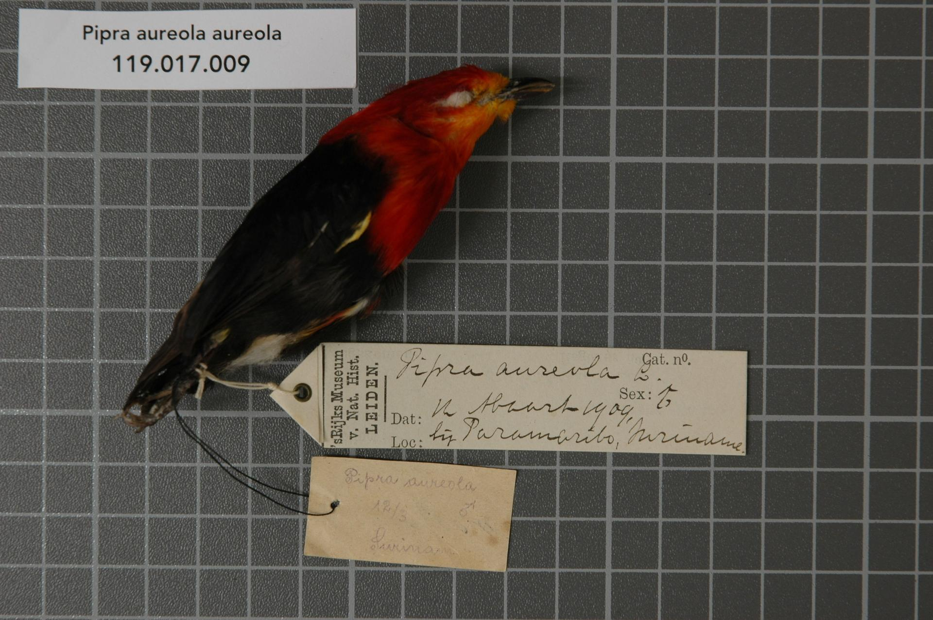 Pipra aureola aureola (Linnaeus, 1758)